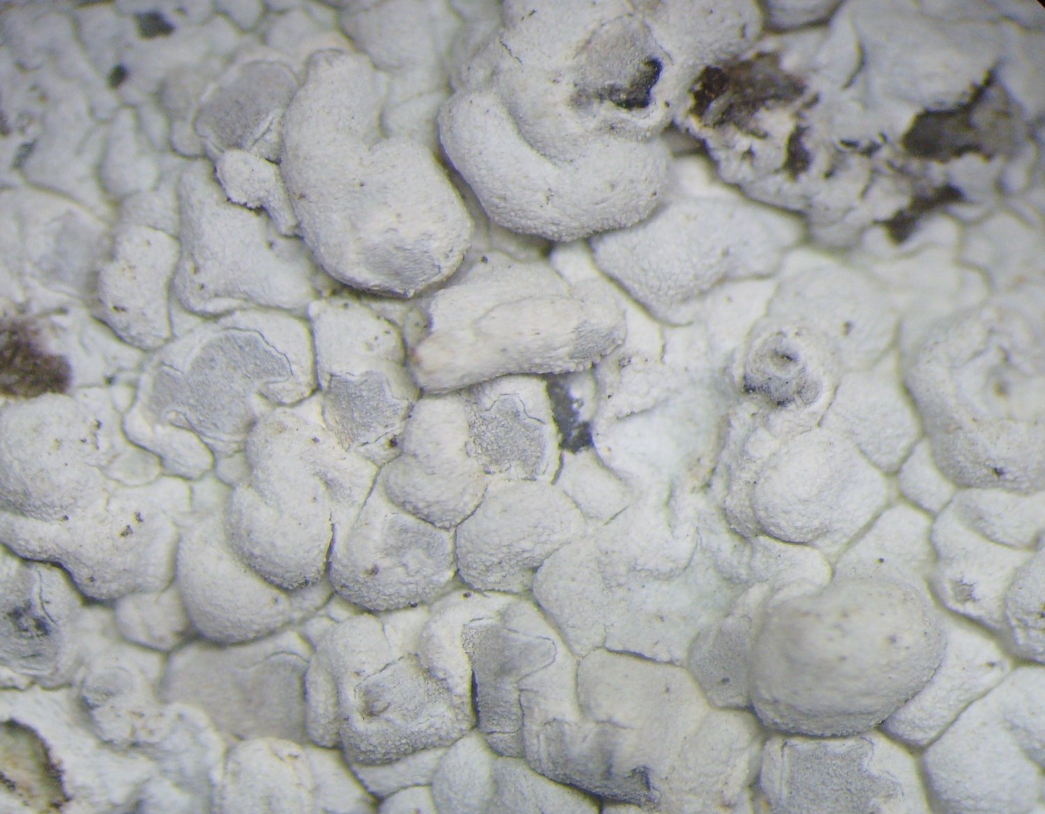 Lecanographa dialeuca (Van, Cléden-Cap-Sizun, Finistère, Bretagne, France)